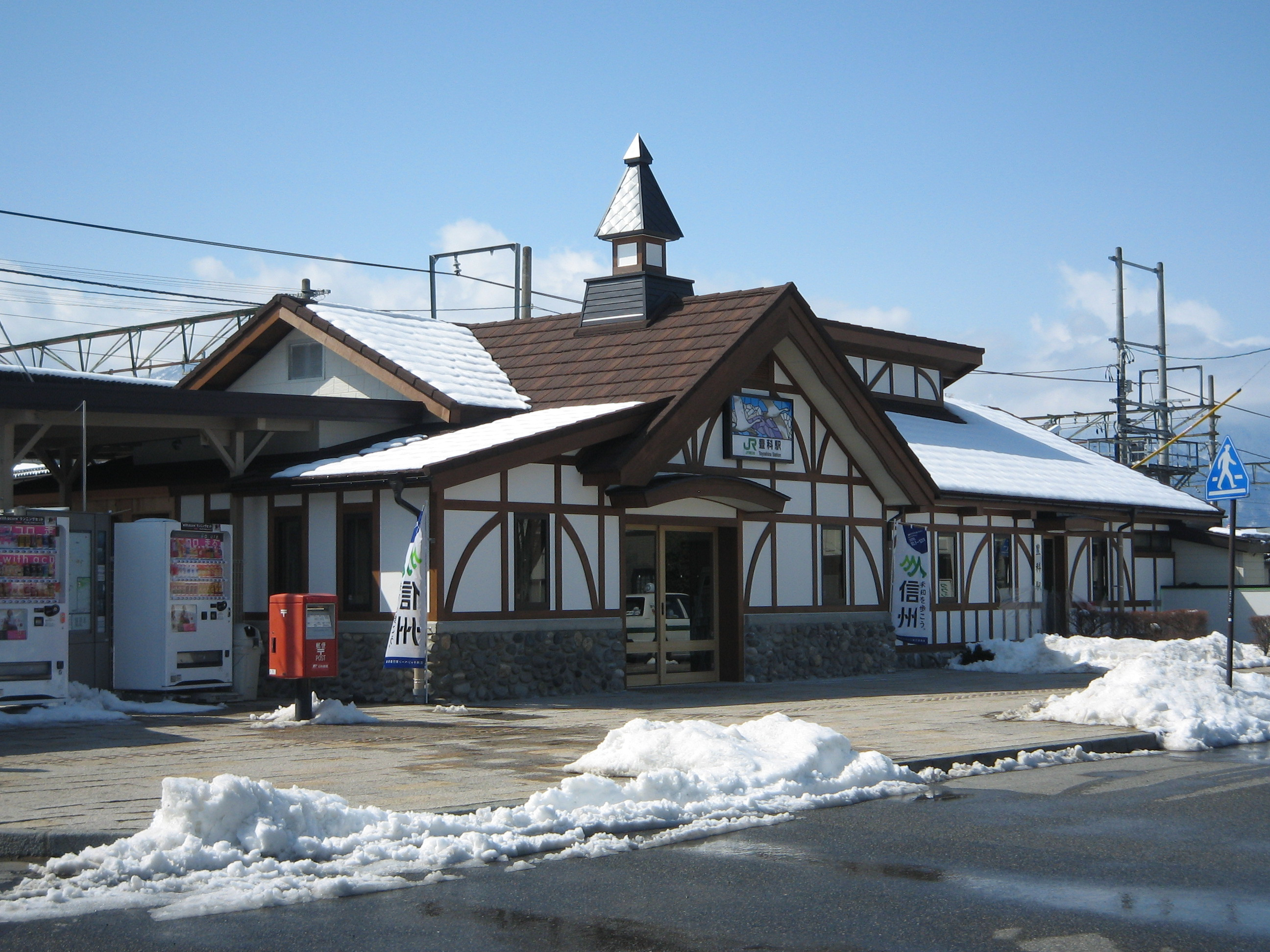 JR東日本 豊科駅